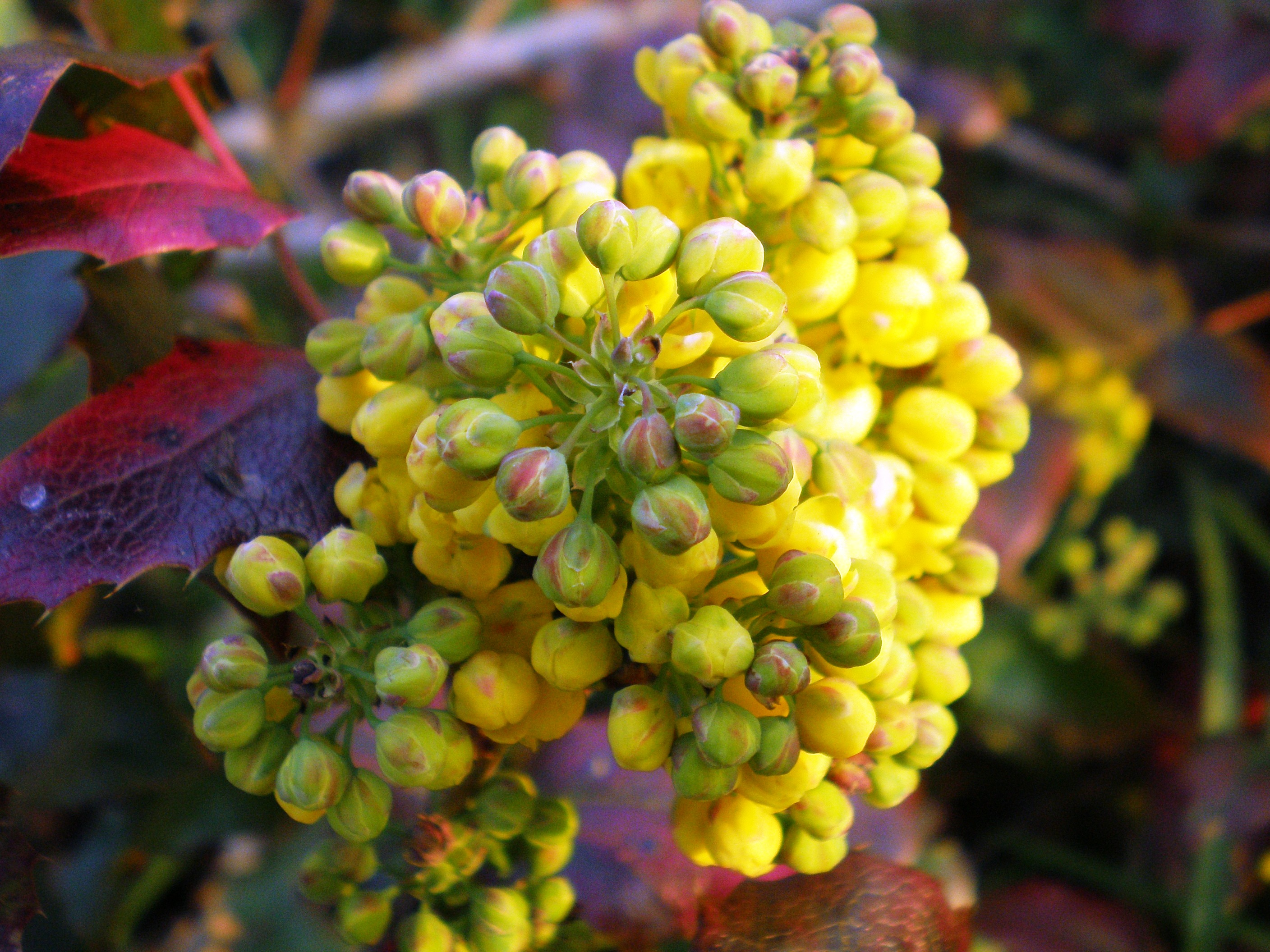 Mahonia aquifolium